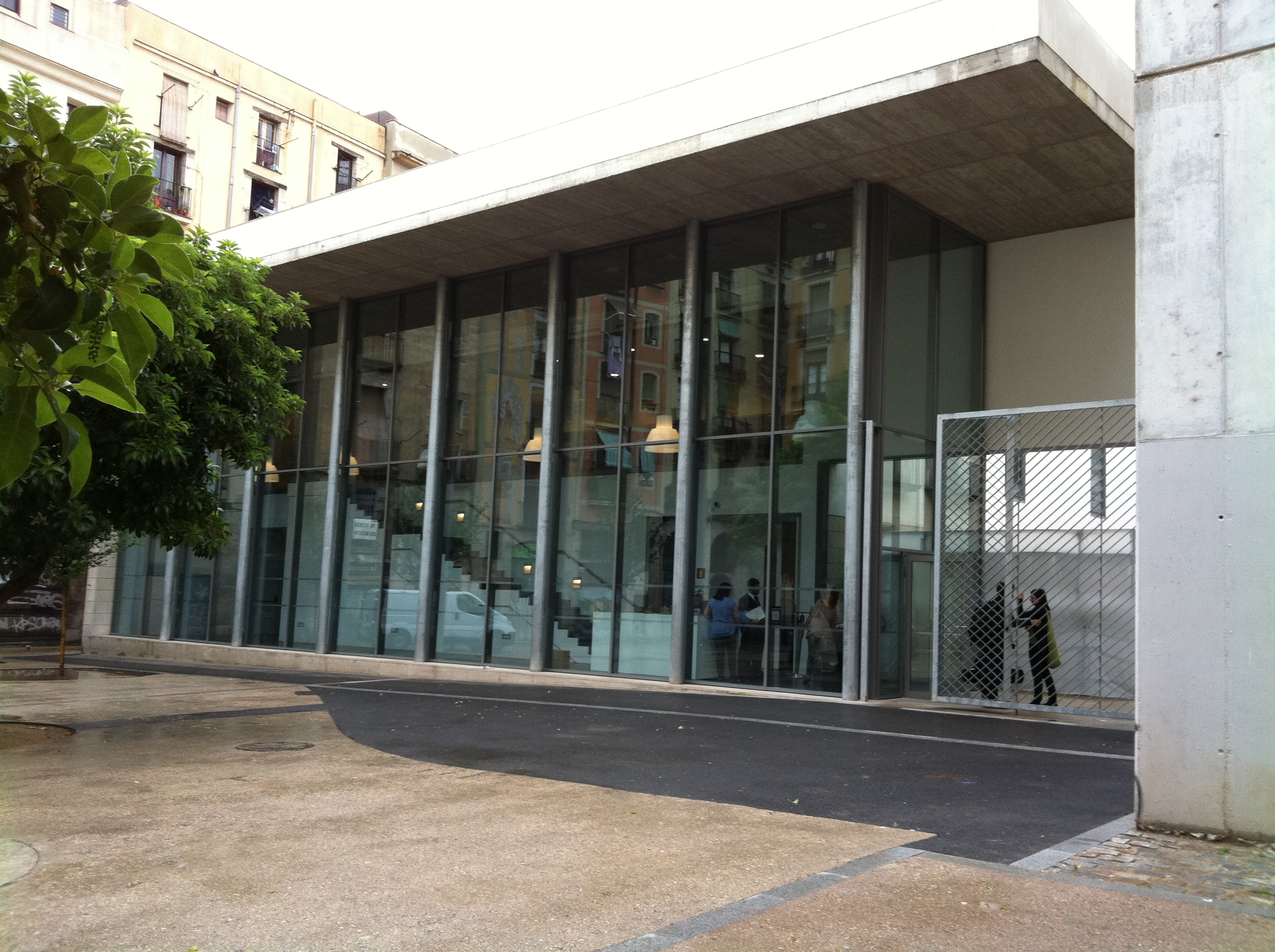 Hack4Europe Barcleona at Museu Picasso